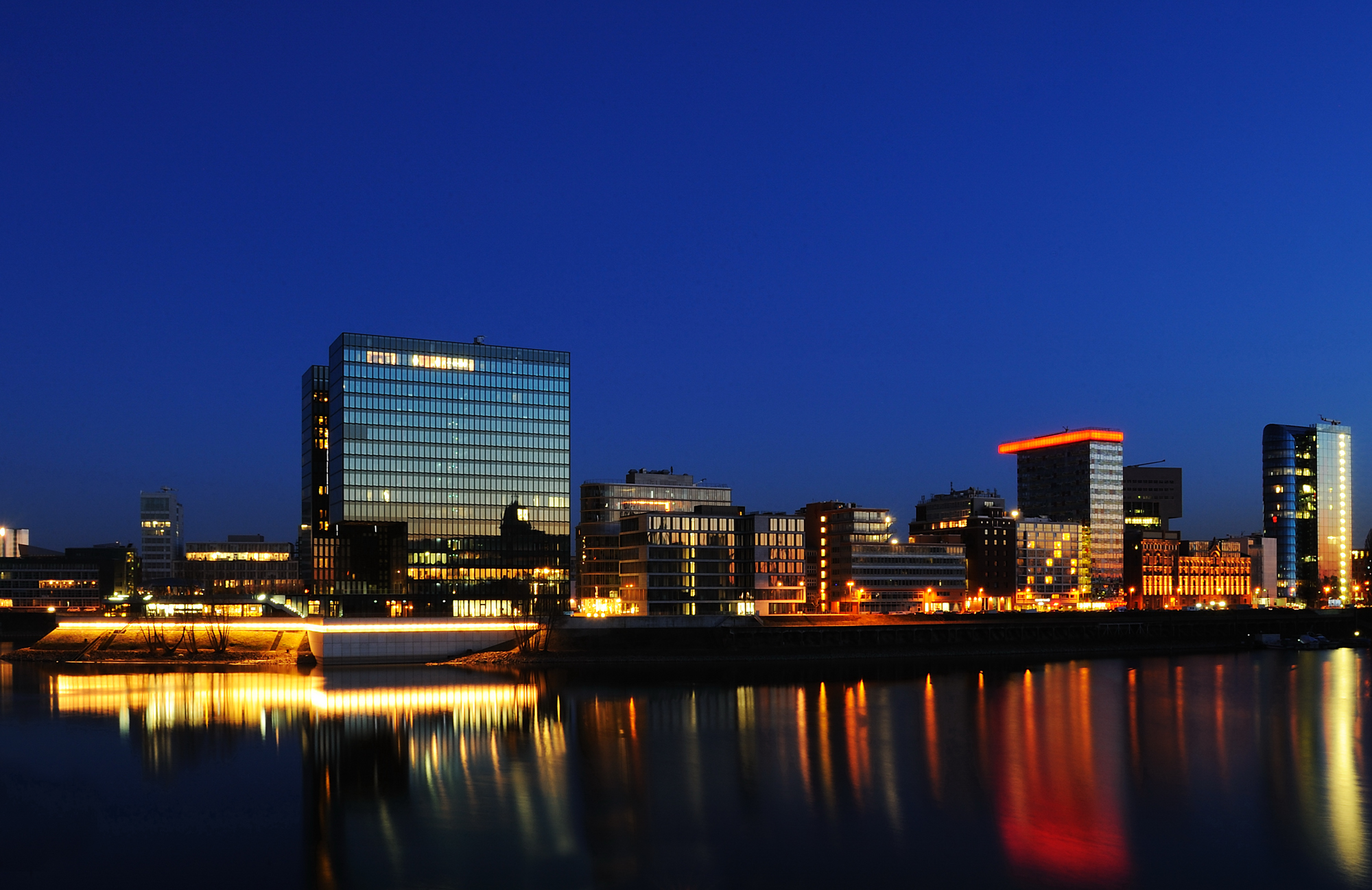 Gebäude der Speditionstraße am Julo-Levin-Ufer mit Hyatt, Colorium und Sign.